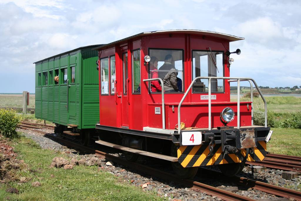 Locotracteur Brimont Latil et voiture du projet "jeunes" de l'ACFCdN